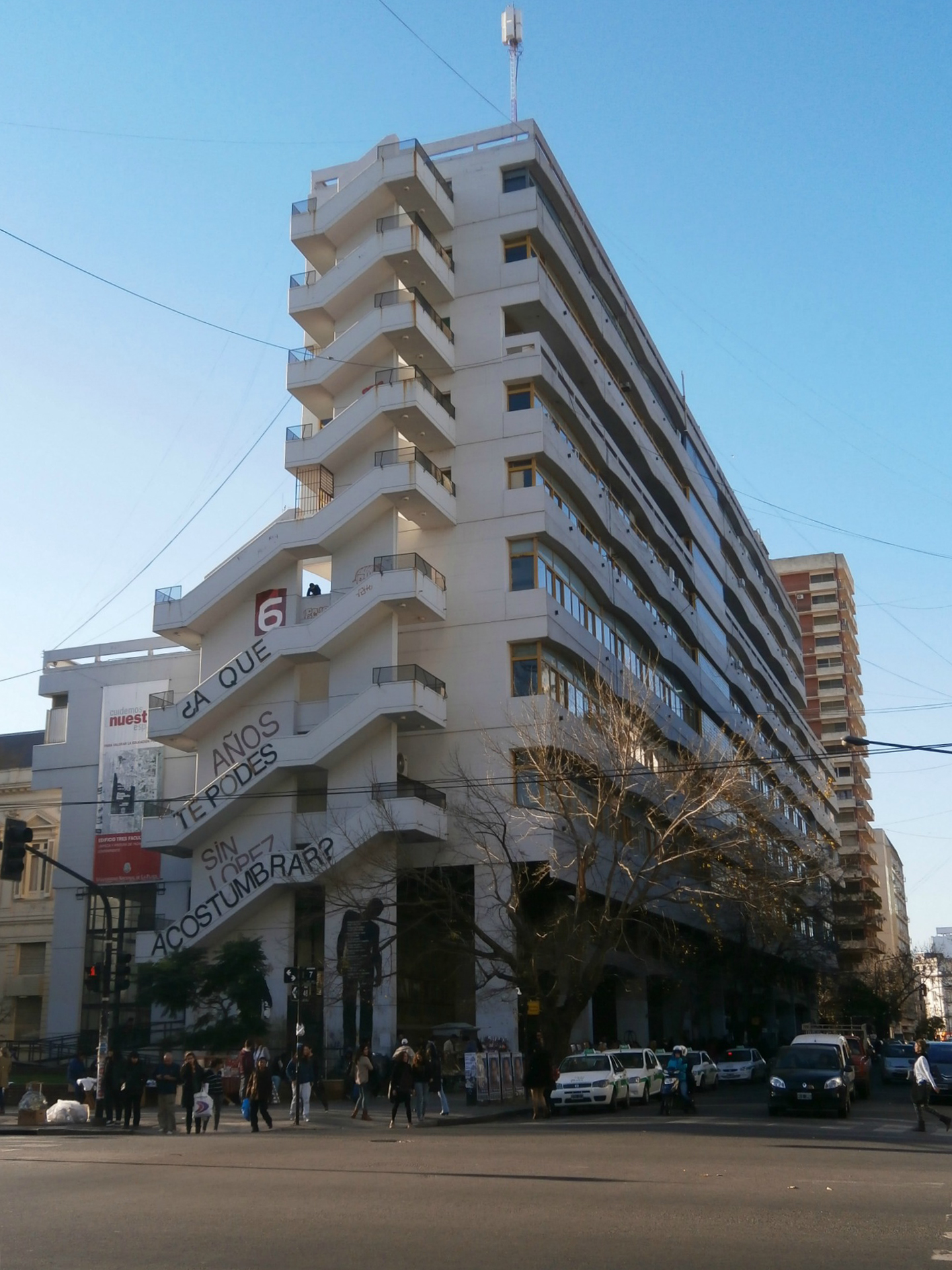 Edificio Tres Facultades de la Universidad Nacional de la Plata. Vista de la esquina de calles 7 y 47.